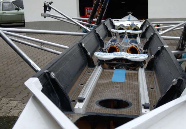 Doppelzweier von oben